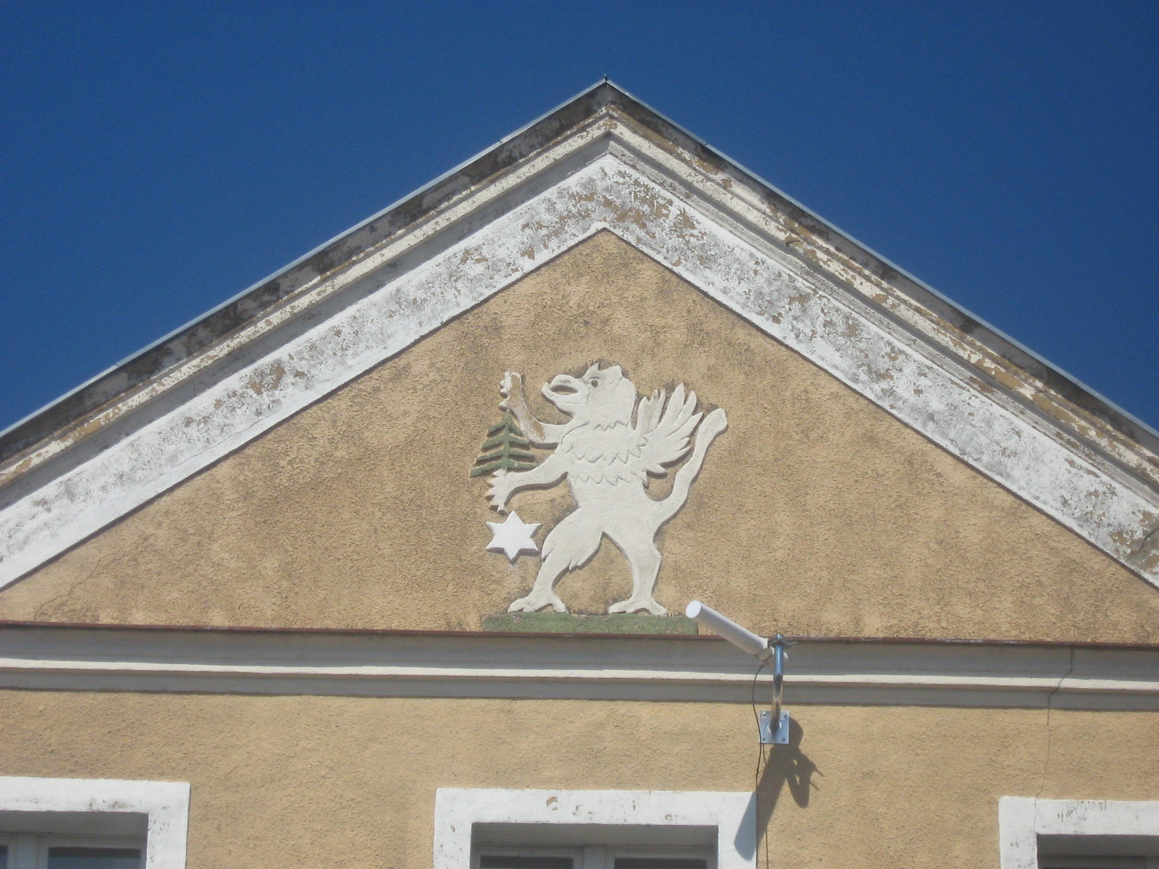 Herb Wolina (przedwojenny) na budynku poczty w Wolinie.